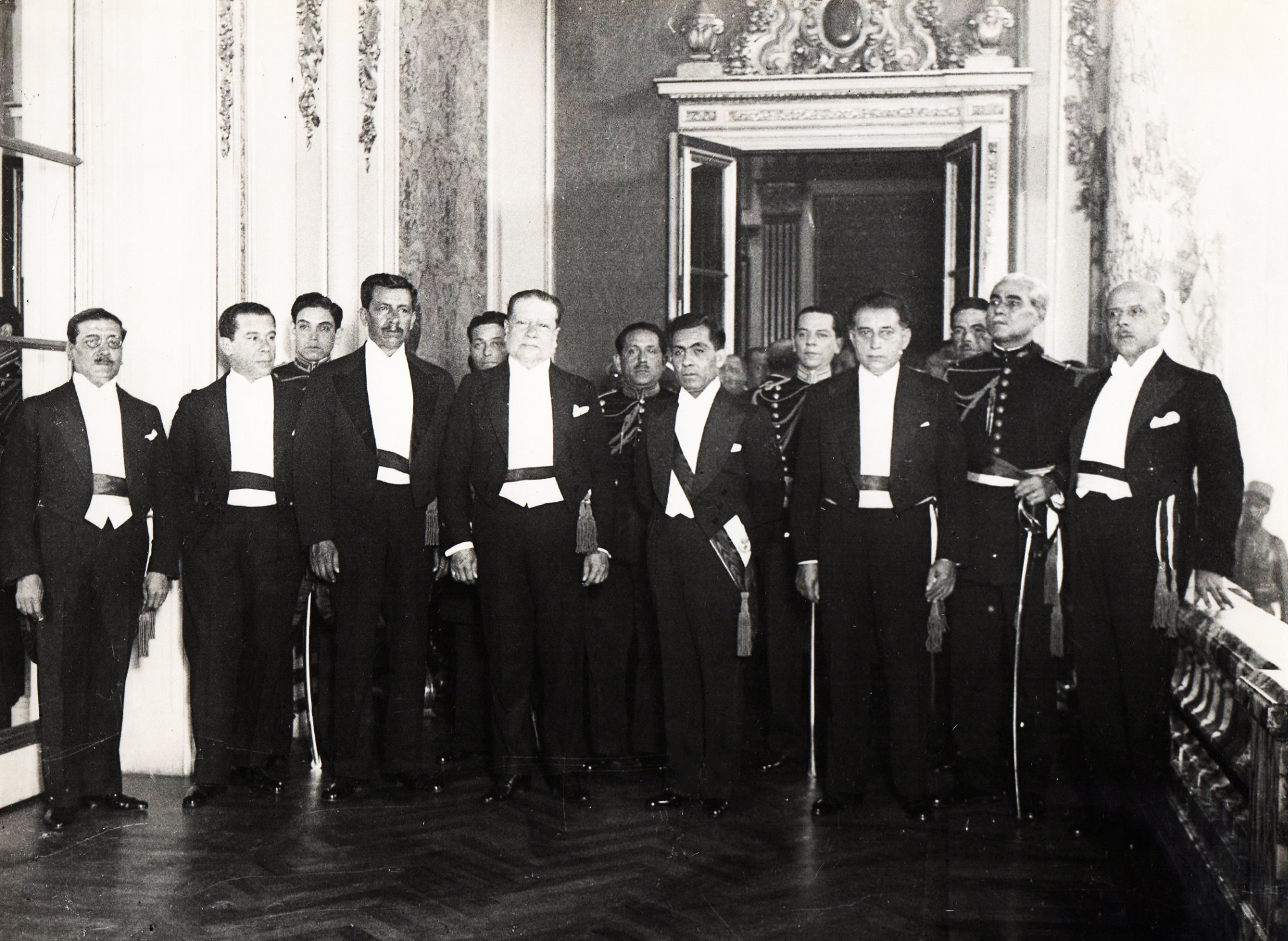 Luis Miguel Sánchez Cerro y sus Gabinetes Ministeriales, 1932